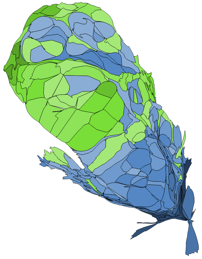 中文（台灣）: 顏色對照表